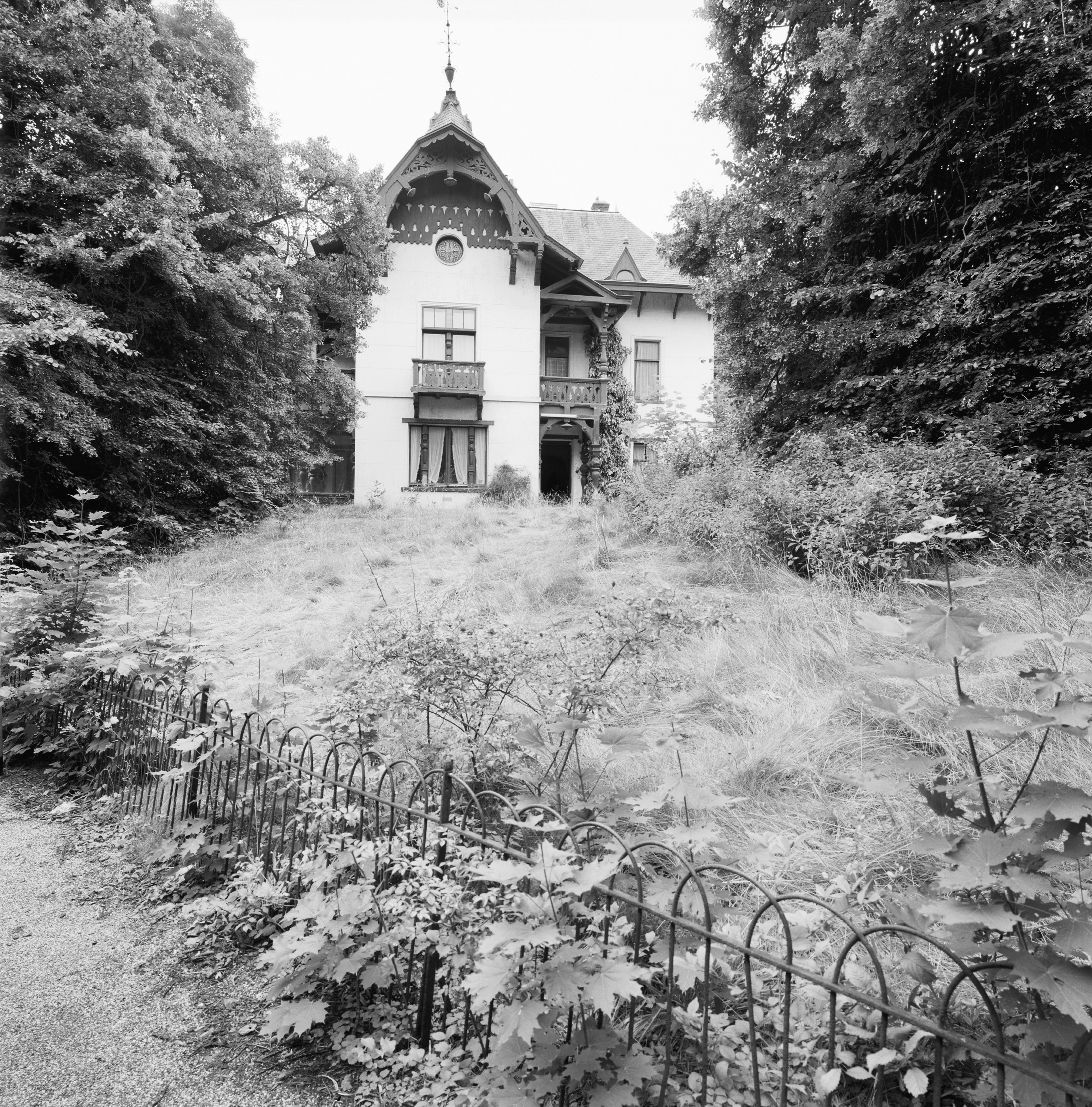 Exterieur OVERZICHT VOORGEVEL